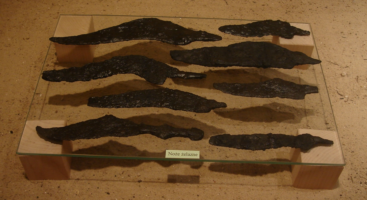 Noże żelazne z okresu halsztackiego w kulturze łużyckiej.